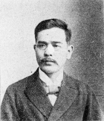 平岡萬次郎